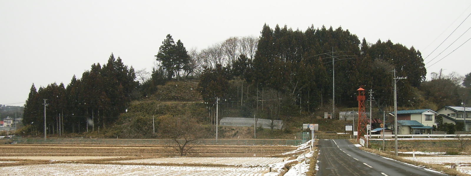 Tsukumobashi Castle Site. Kurihara, Miyagi prefecture, Japan.